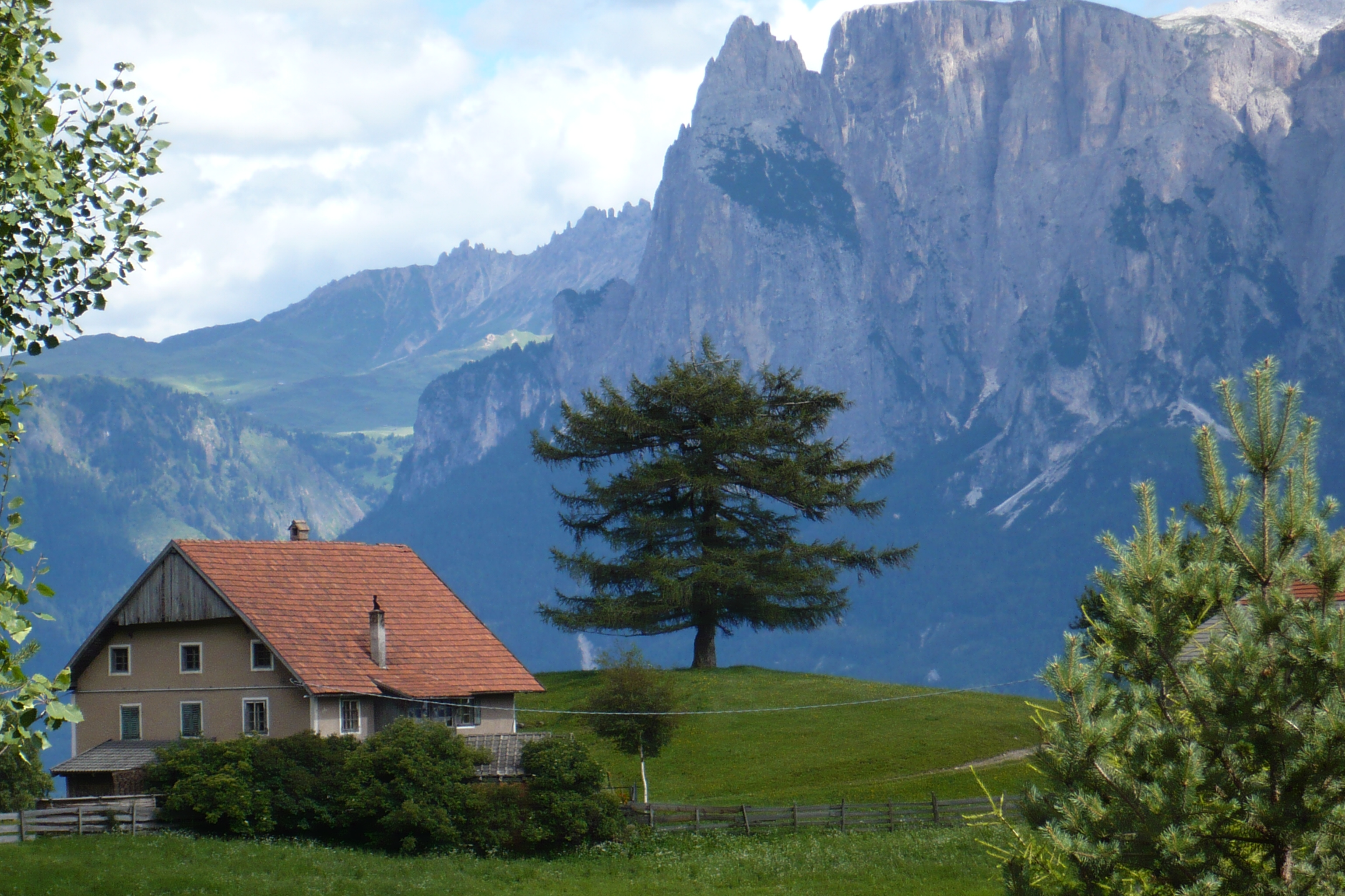 Hofer-Hof in Mittelberg mit dem Schlernmasssiv im Hintergrund